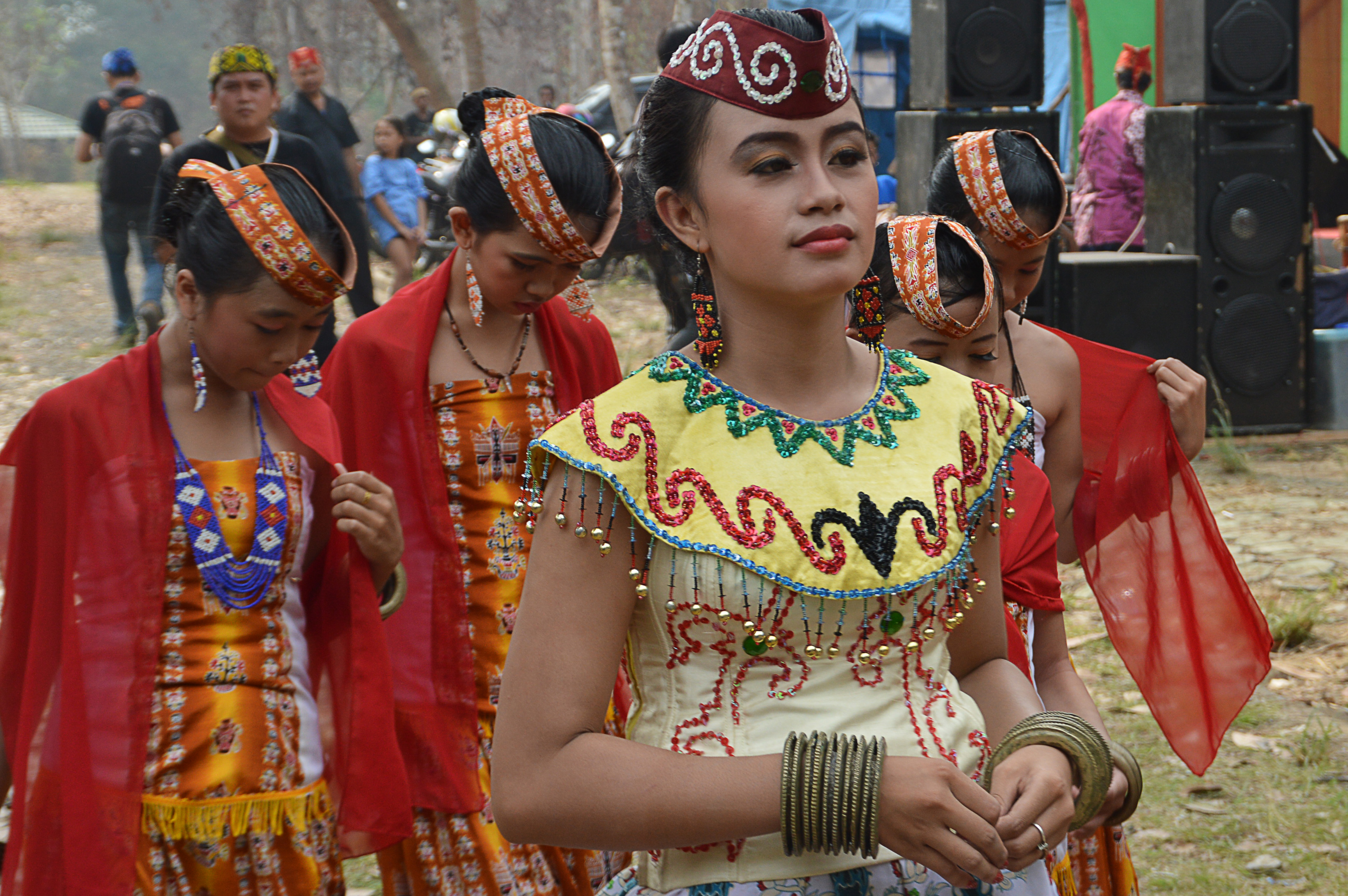 Remaja wanita Dayak Maanyan di Keang Ethnic Festival tahun 2015.